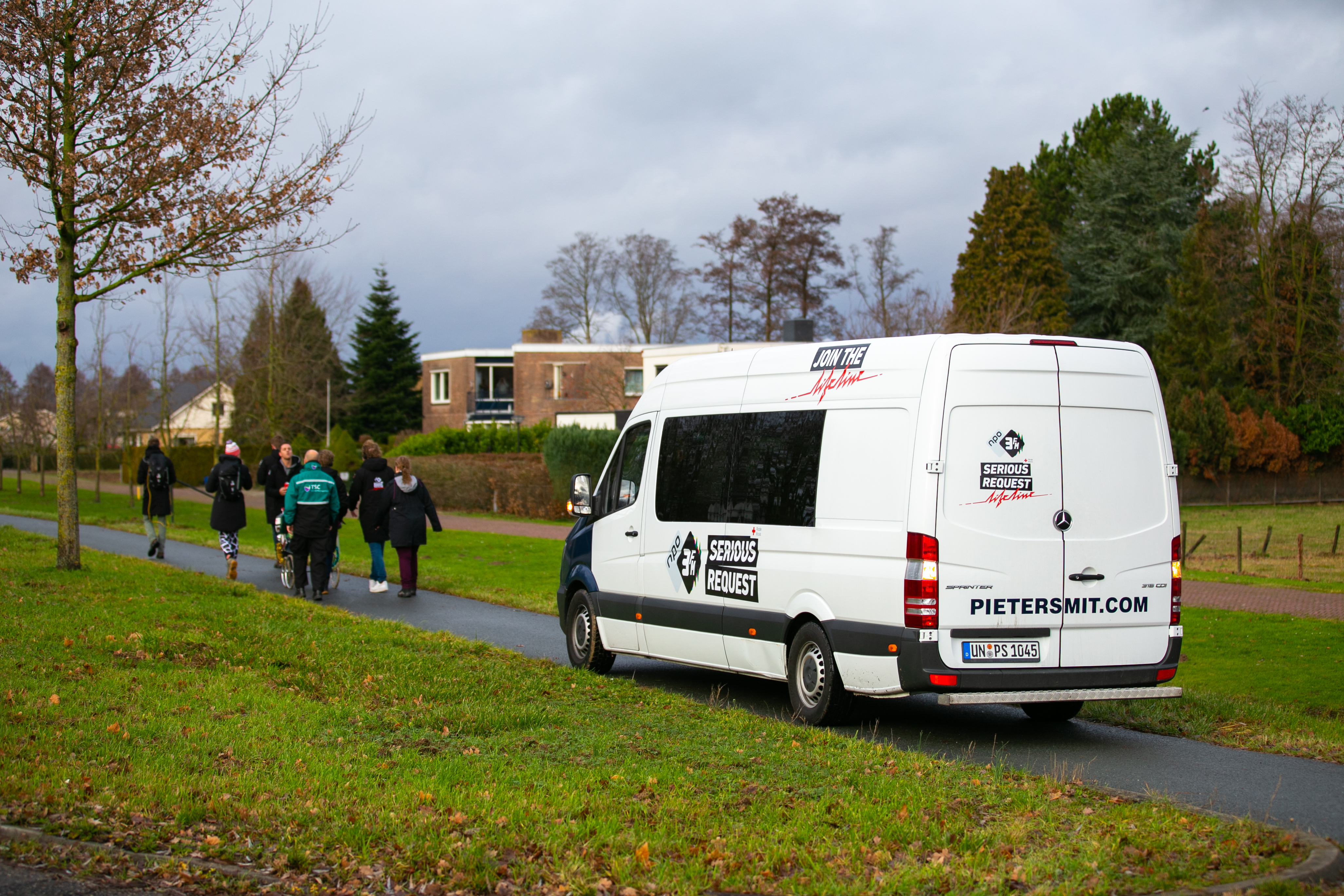 Achter de schermen bij Serious Request The Lifeline: met links het wandelende dj-team Mark en Ramon en rechts een productiebus van NPO3FM